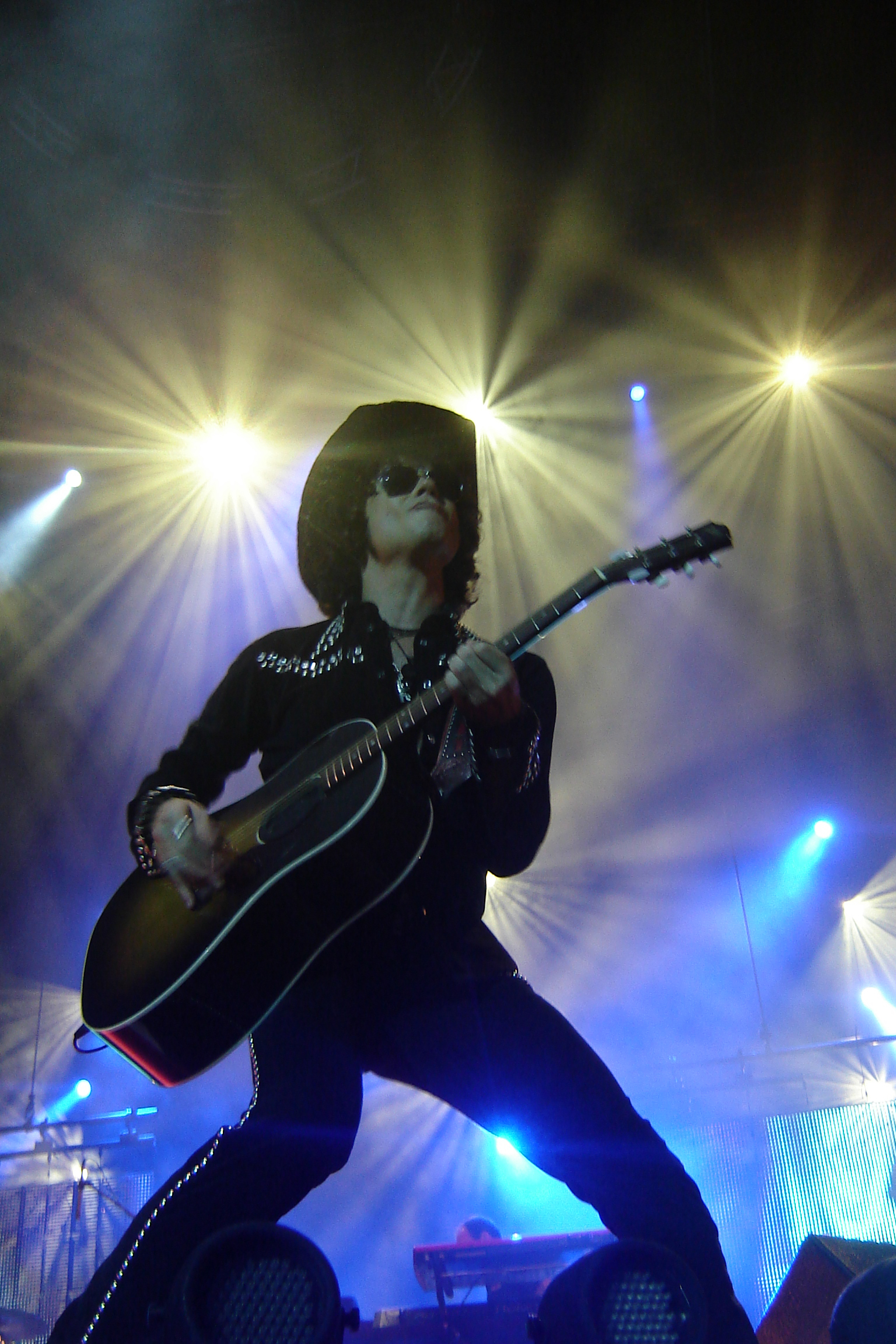 El cantante español Enrique Bunbury.